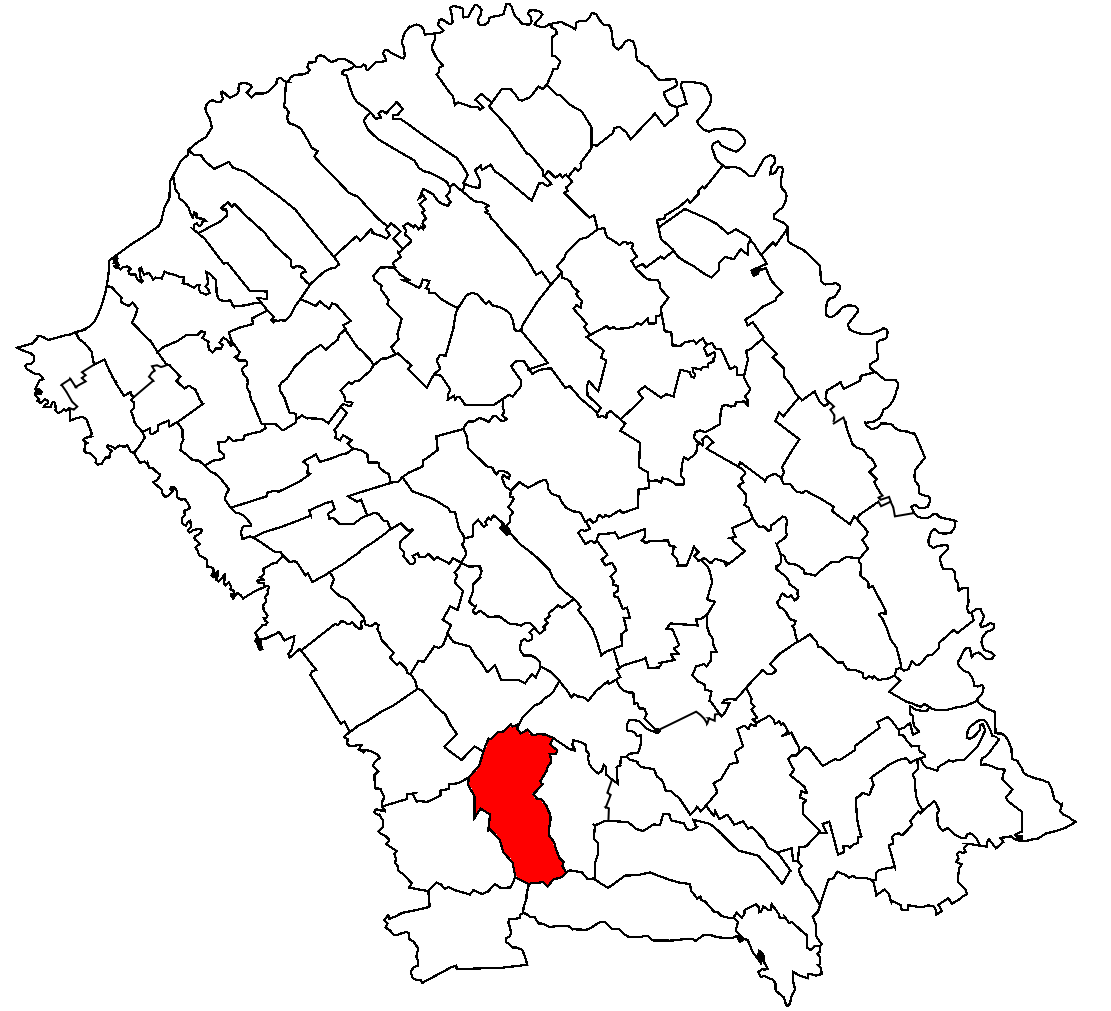 Categorie:Hărţi ale judeţului Botoşani